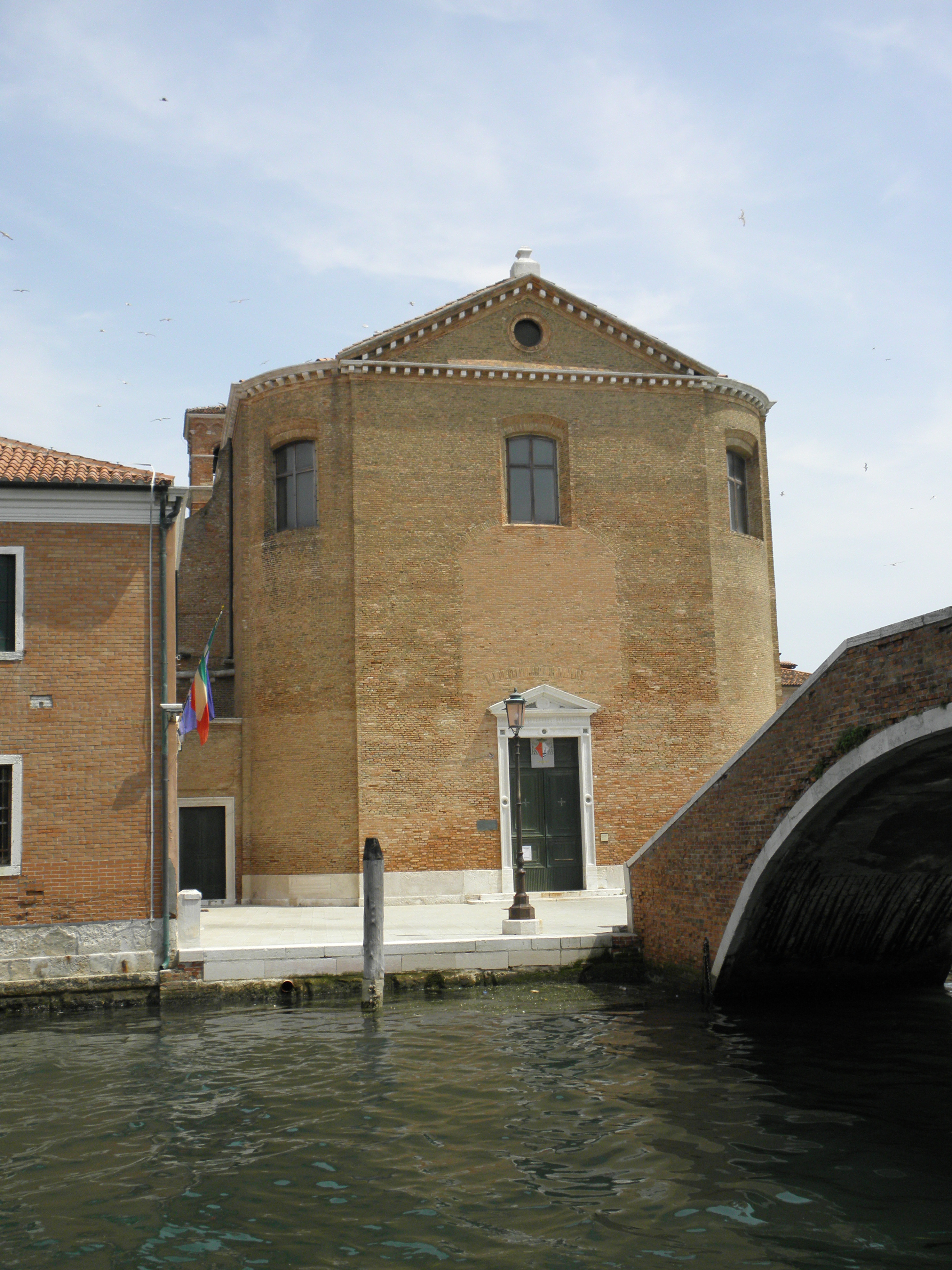 Chioggia: la chiesa parrocchiale di San Domenico.